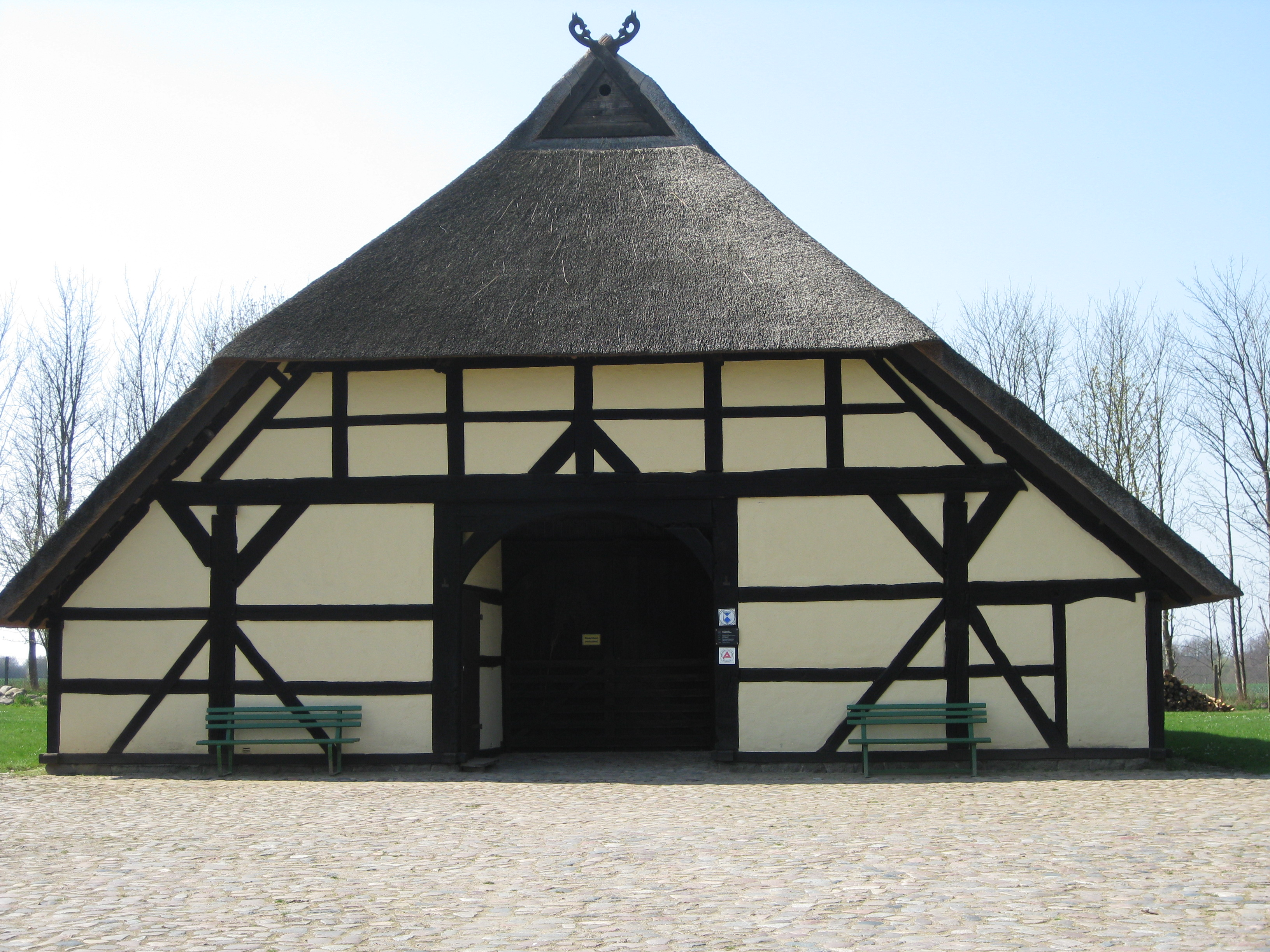 Das Bechelsdorfer Schulzenhaus von 1525 ist seit 1972 Mittelpunkt eines kleinen Freilichtmuseums in Schönberg, Meckl.